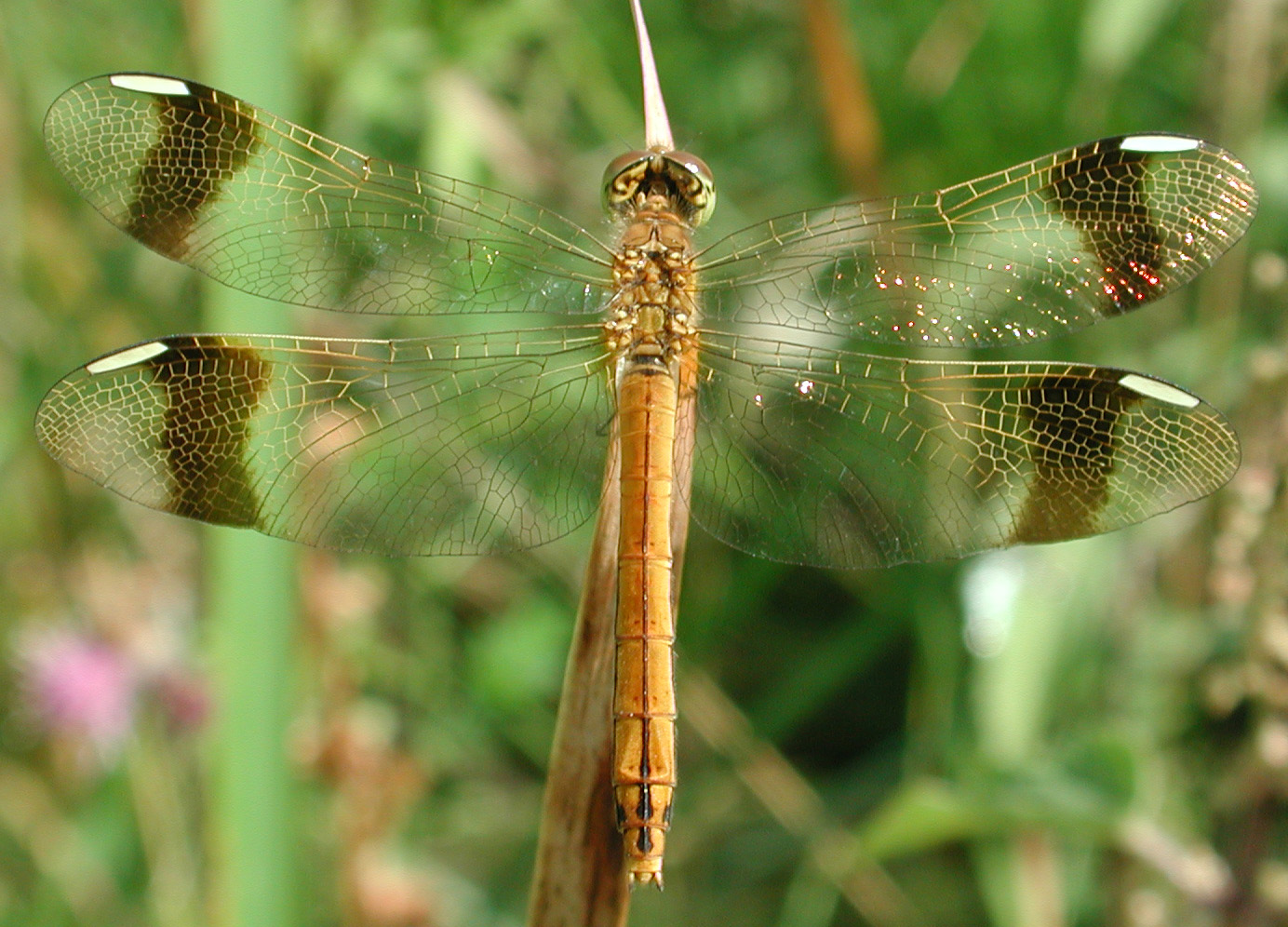 Sympetrun pedemontanum, f., NSG Kirchwerder Wiesen, Elbmarsch bei Hamburg, Deutschland